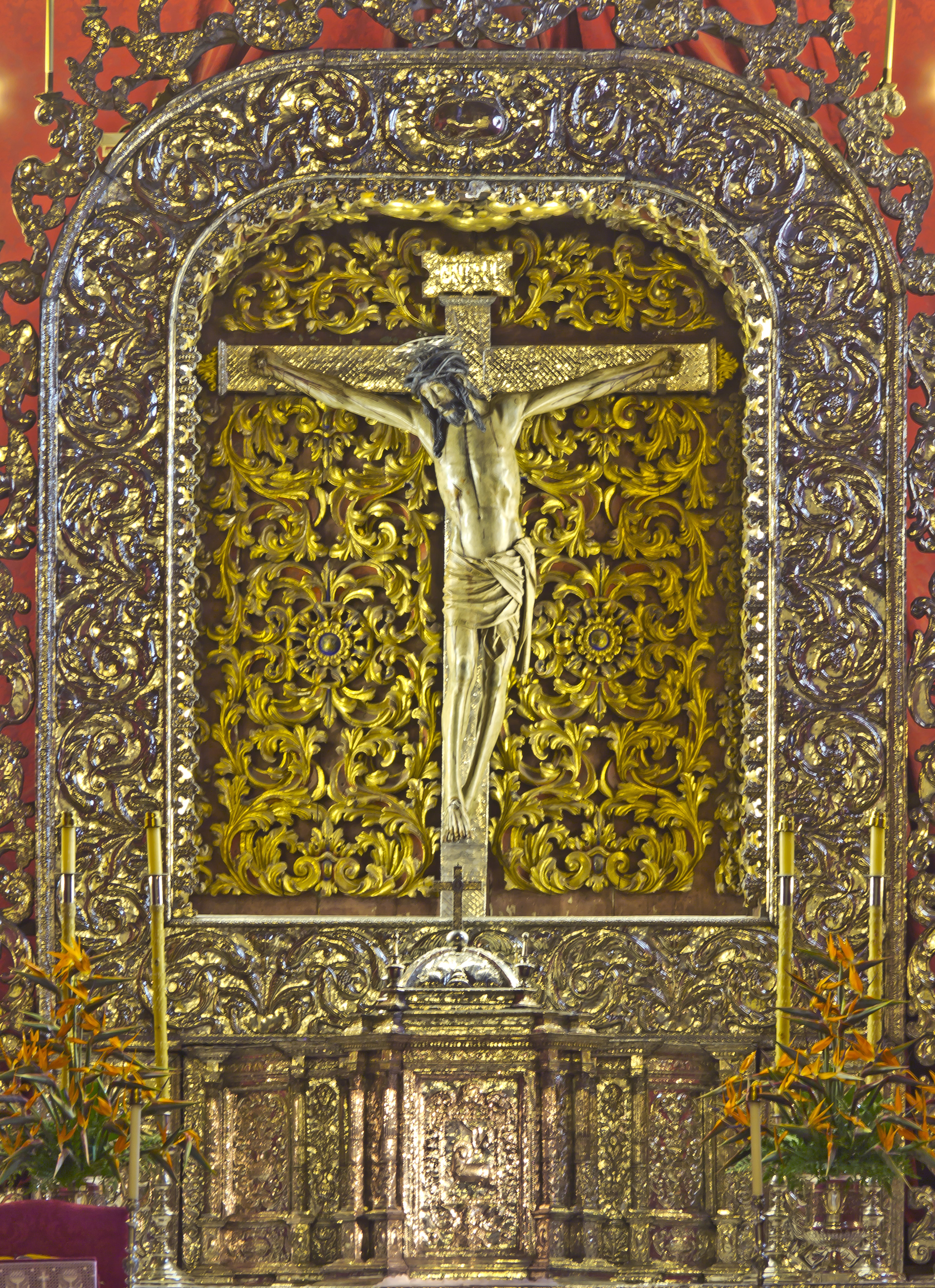 Santíssimo Cristo im Hauptaltar in der Kirche Real Santuario del Cristo de La Laguna in San Cristóbal de la Laguna